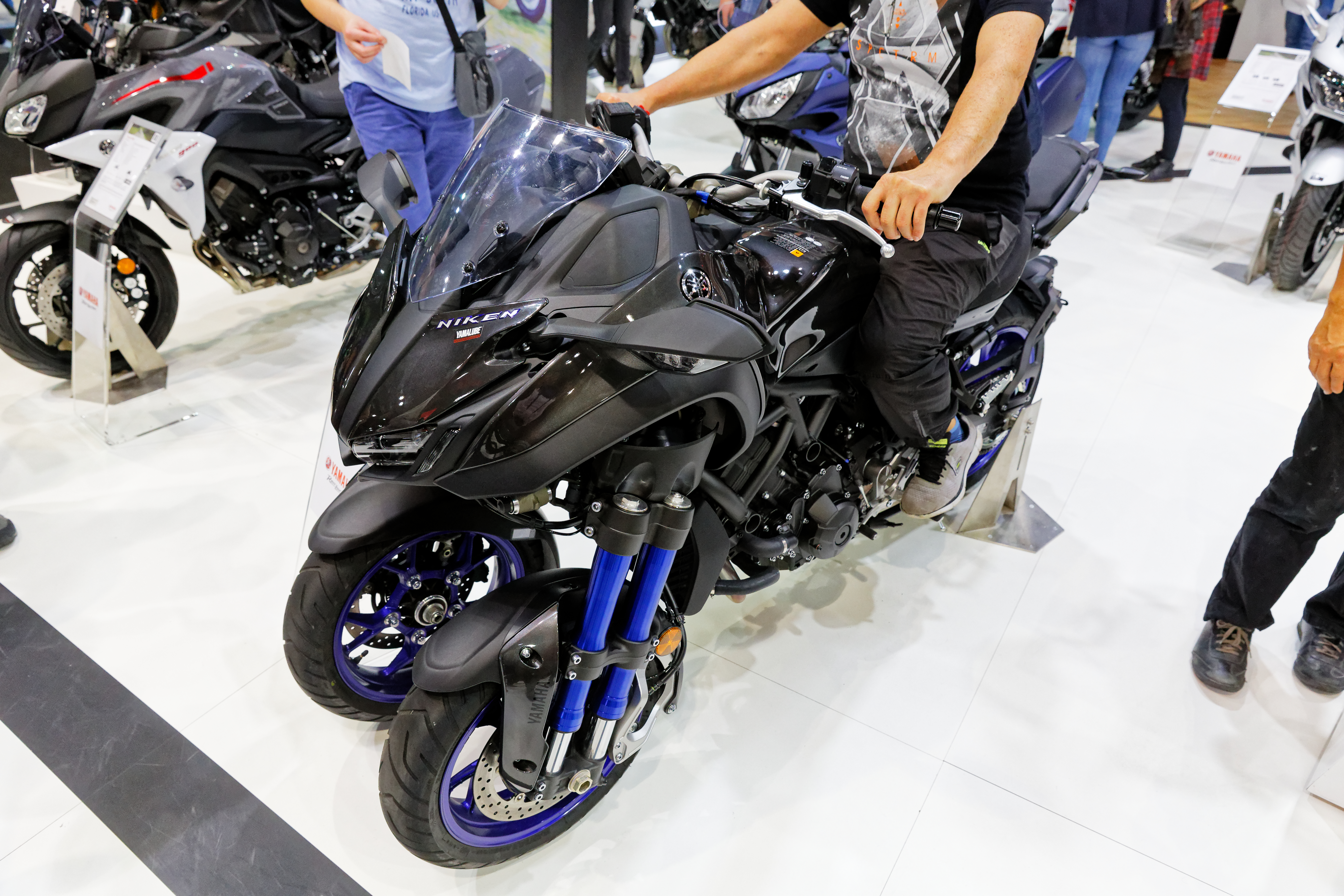 Une Yamaha Niken exposée lors du mondial de l'automobile de Paris 2018.